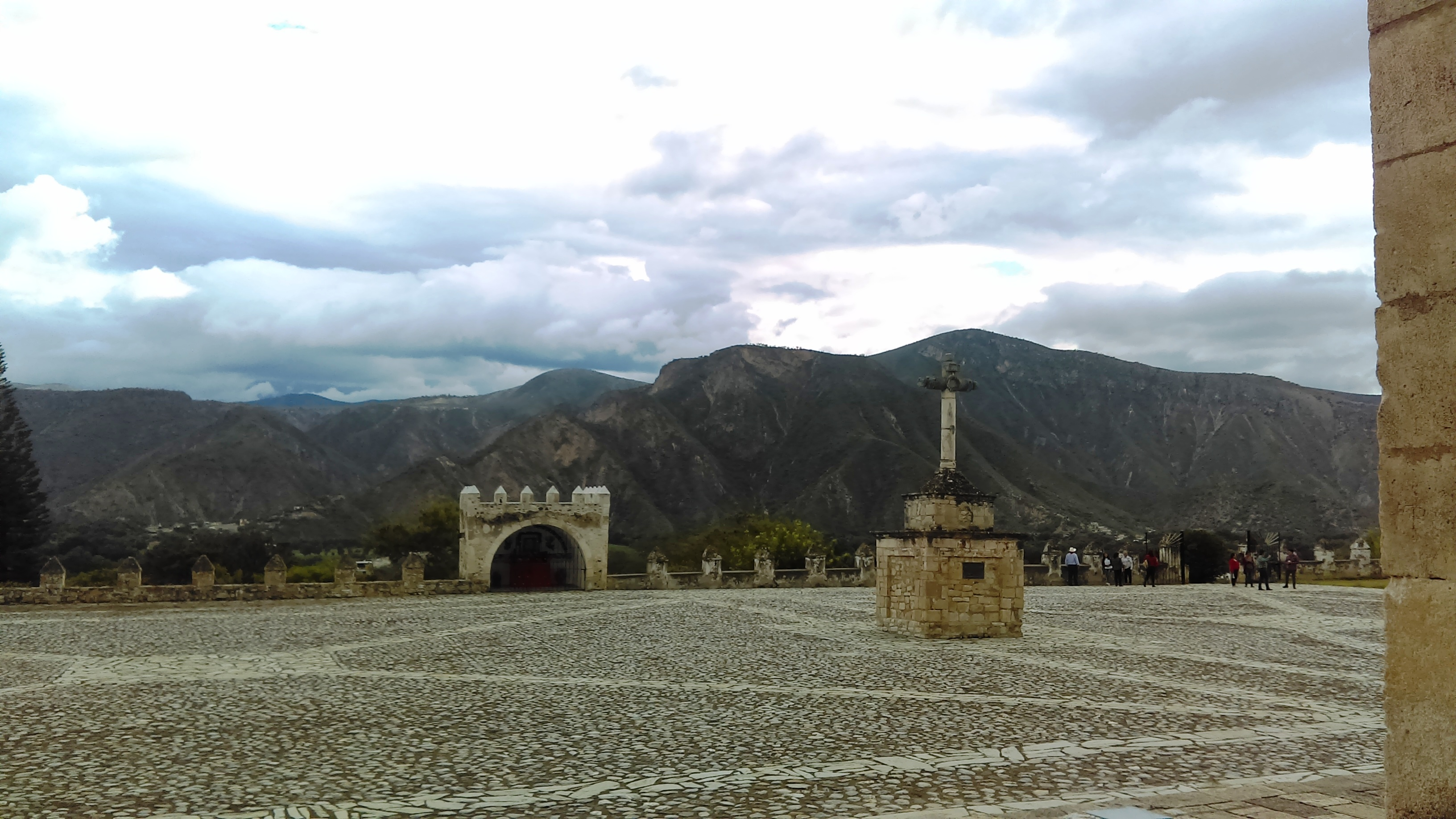 Templo y exconvento de los Santos Reyes, Metztitlán.